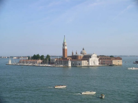 Ile de San Giogio. Venise